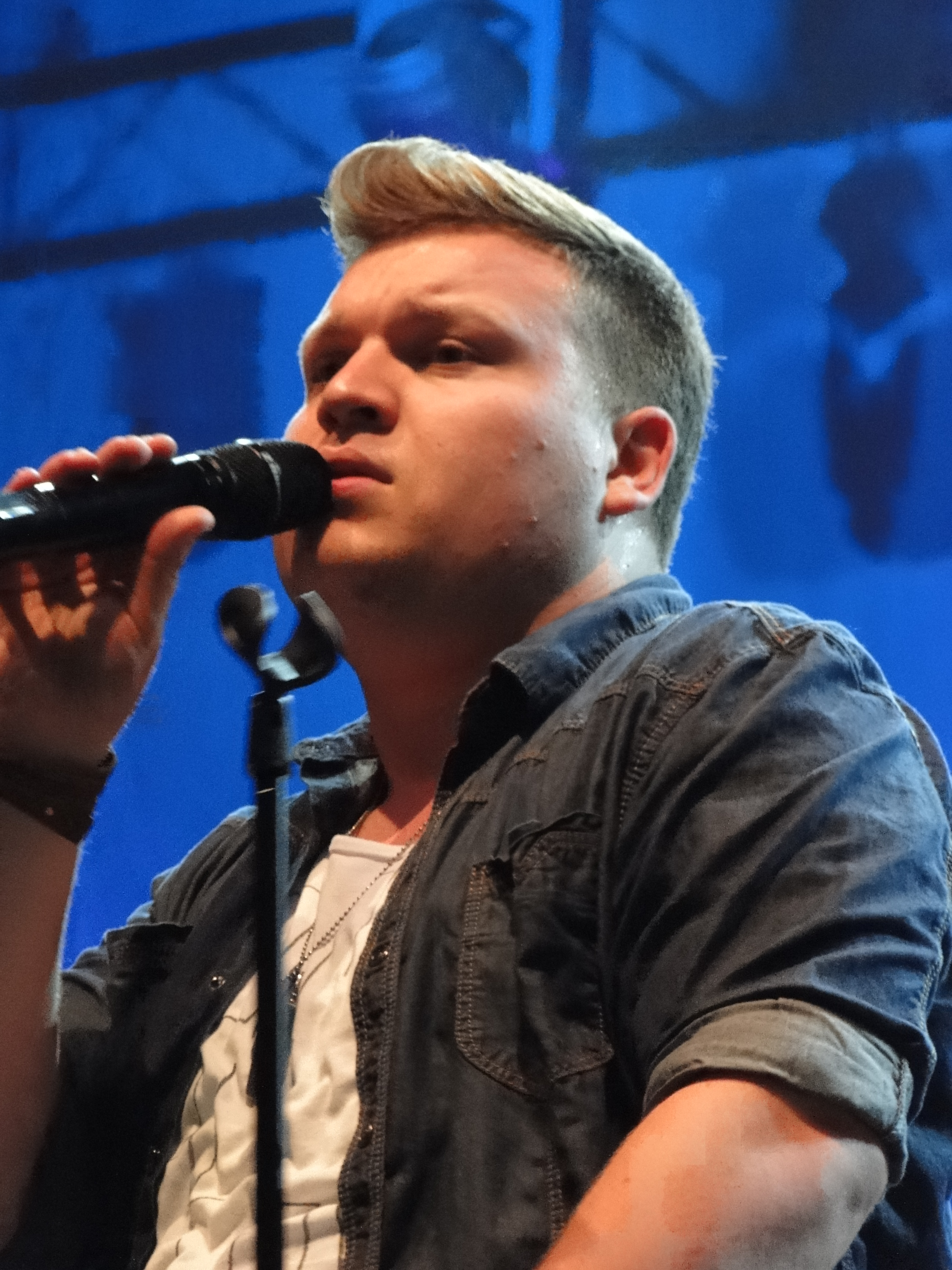 Sänger Michael Heinemann ("The Voice of Germany") bei einem Auftritt in Dresden